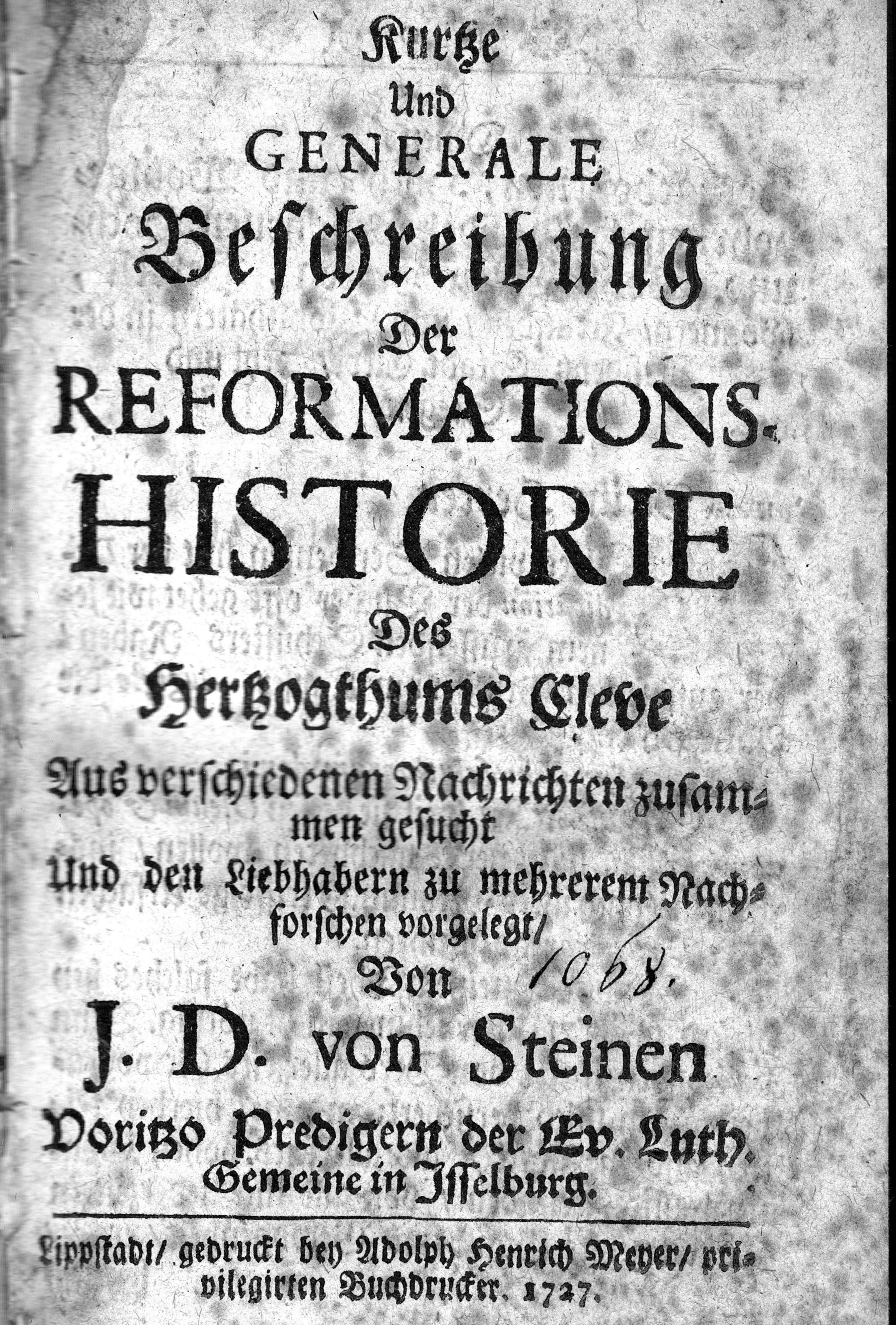 Johann Dietrich von Steinen, Kurtze und generale Beschreibung der Reformations-Historie des Hertzogthums Cleve, Adolph Henrich Meyer, Lippstadt 1727